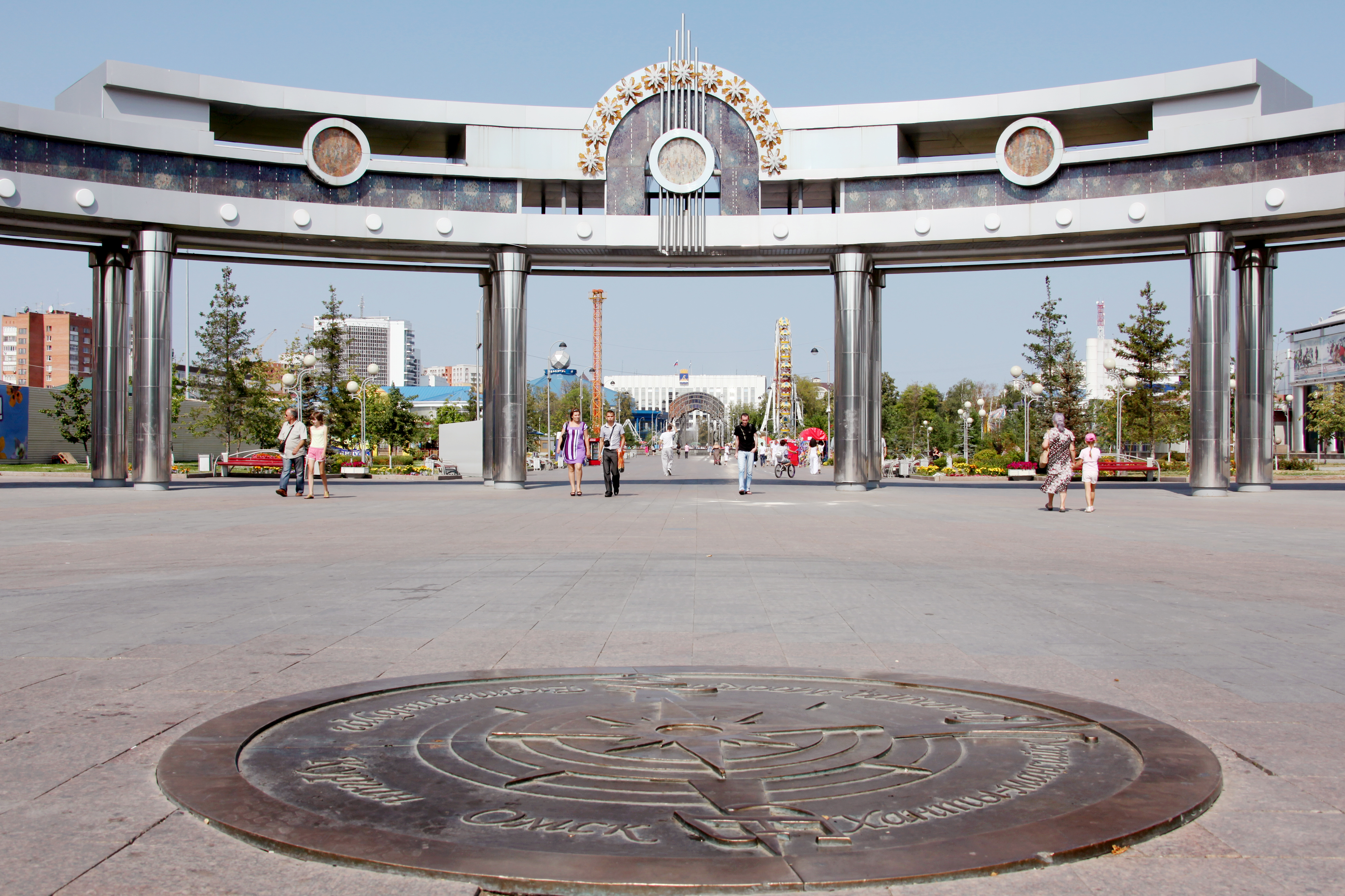 Kolora bulvardo. Tjumeno, Rusio.